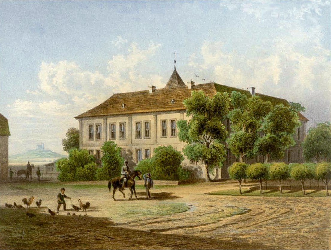 Rittergut Merbitz, Lithografie aus dem 19. Jahrhundert